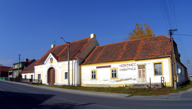 Barokní zájezdní hostinec Na Dyškánce v Hadačce.